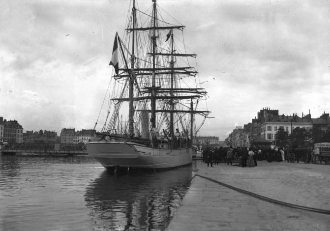 le Pourquoi Pas au Havre non tiré [1908] (photographie de presse)